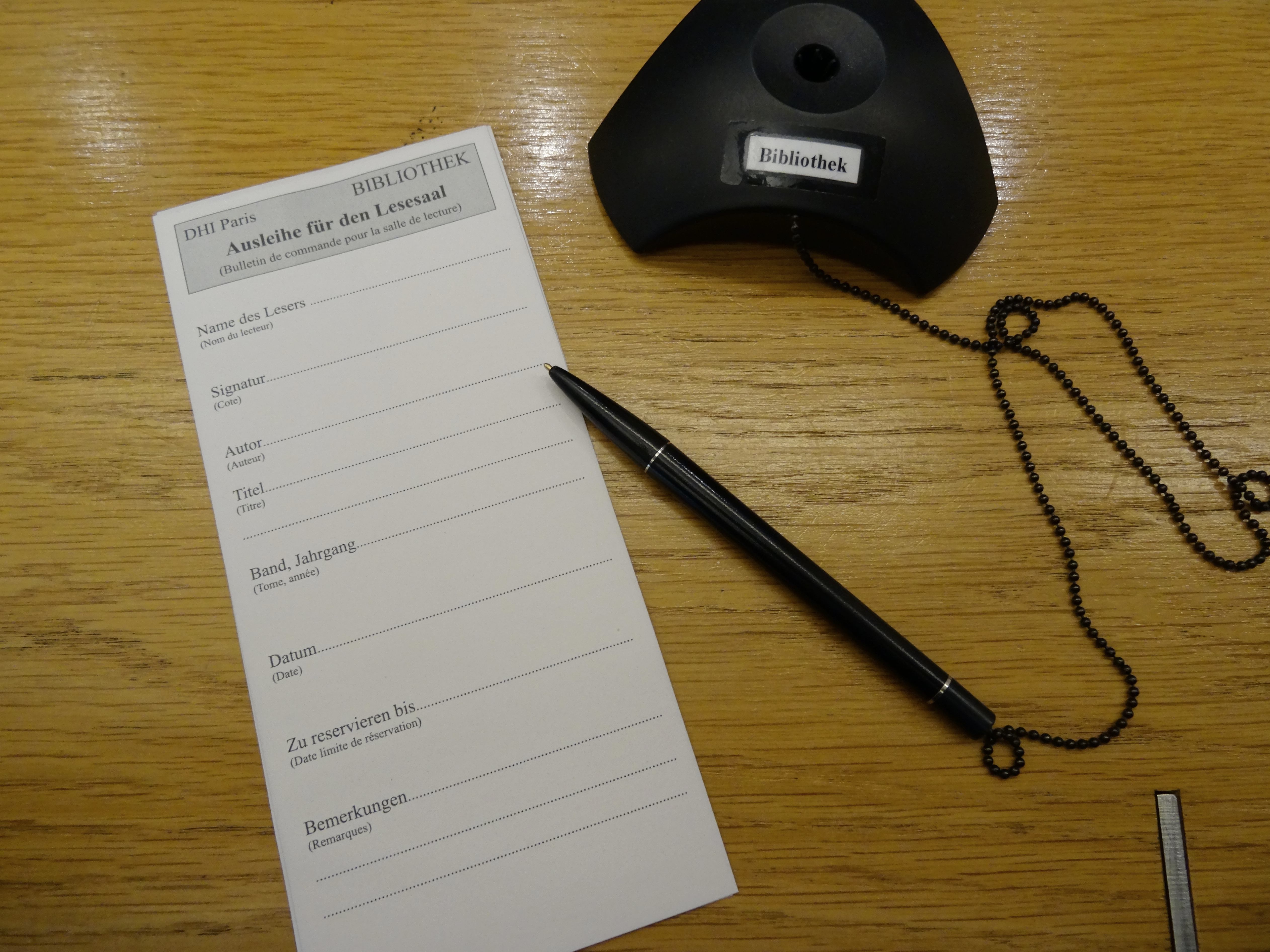 Leihscheine füllen Sie bitte für alle Magazinbestände aus. Bestellungen werden sofort erledigt, und das Buch liegt nach wenigen Minuten an der Theke für Sie bereit. Die Bibliothek des DHI ist eine Präsenzbibliothek, d.h. die Bestände sind nicht ausleihbar. Pour consulter un ouvrage qui se trouve dans notre réserve, vous remplissez un bulletin de commande en salle de lecture. Les commandes d’ouvrages sont traitées immédiatement et quelques minutes plus tard l'ouvrage sera disponible à l'accueil.